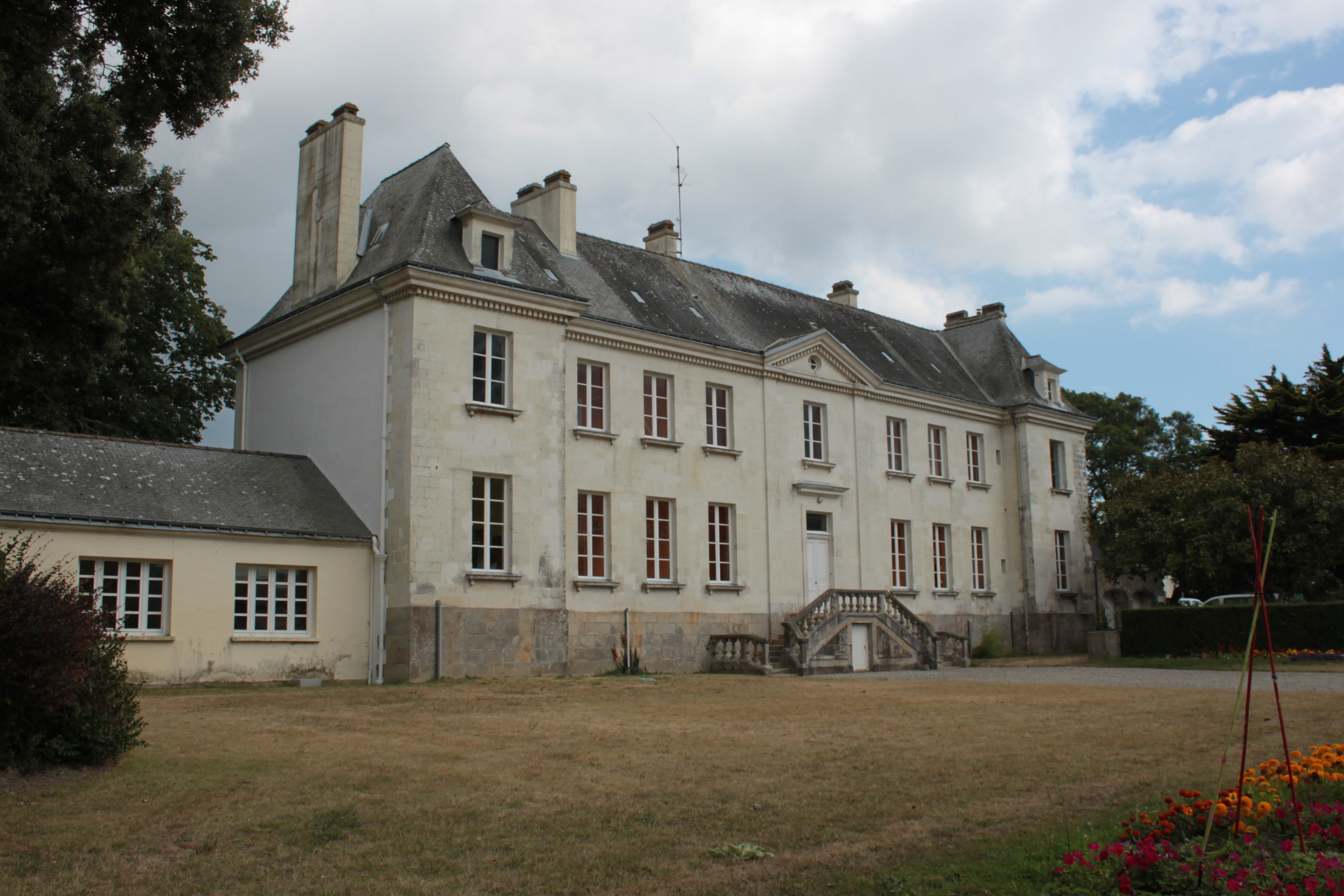 Bâtiment principal de Notre-Dame-de-Prières. Fr-56-Billiers.